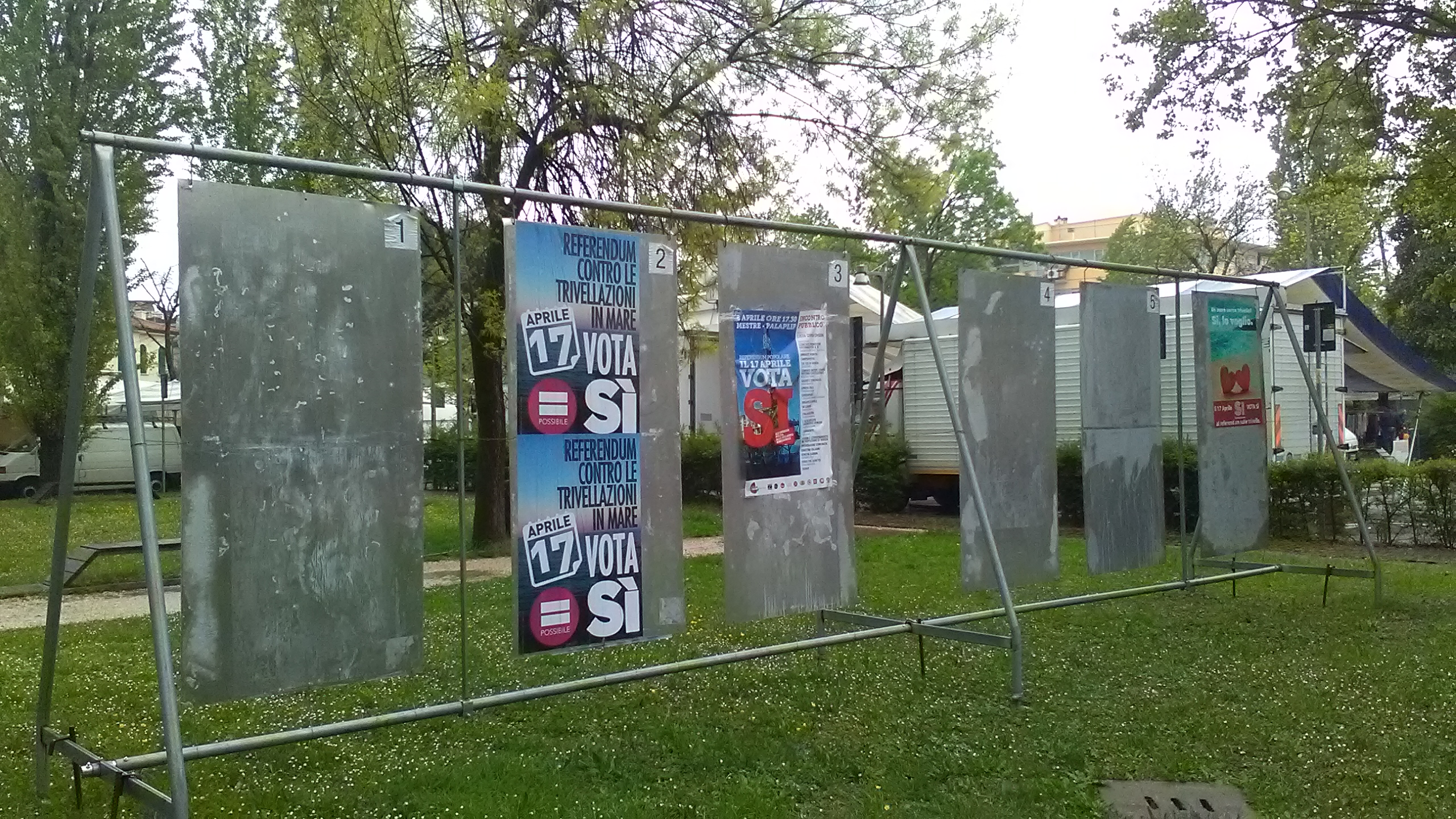 Propaganda elettorale in occasione del referendum del 17 aprile 2016 a Marghera (Venezia)